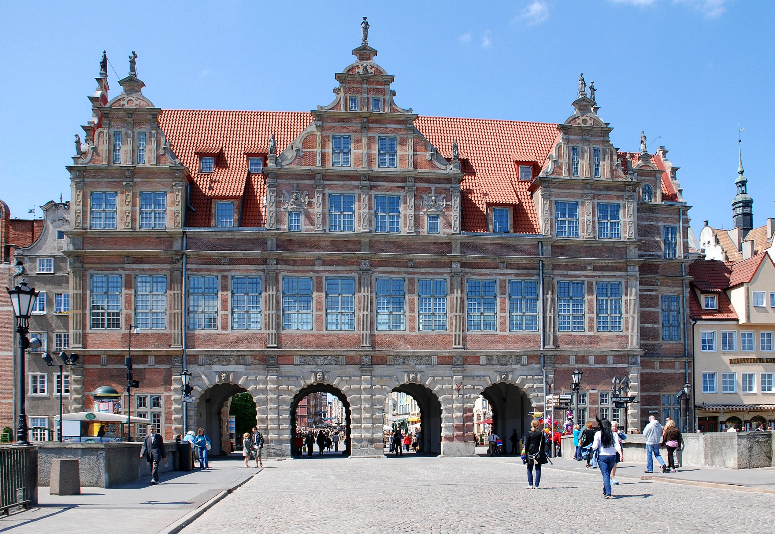 miasto Gdańsk